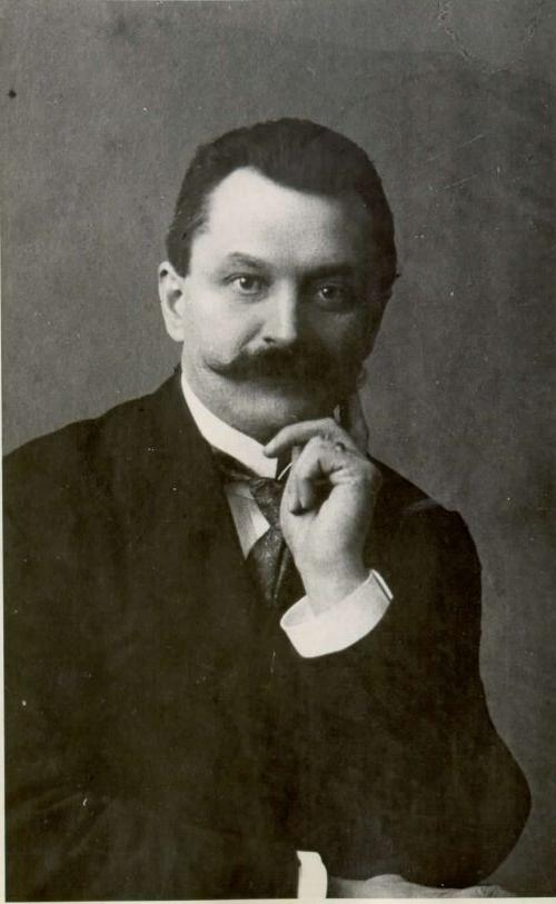 Matija Murko (1862-1952), Slovene philologist and linguist.